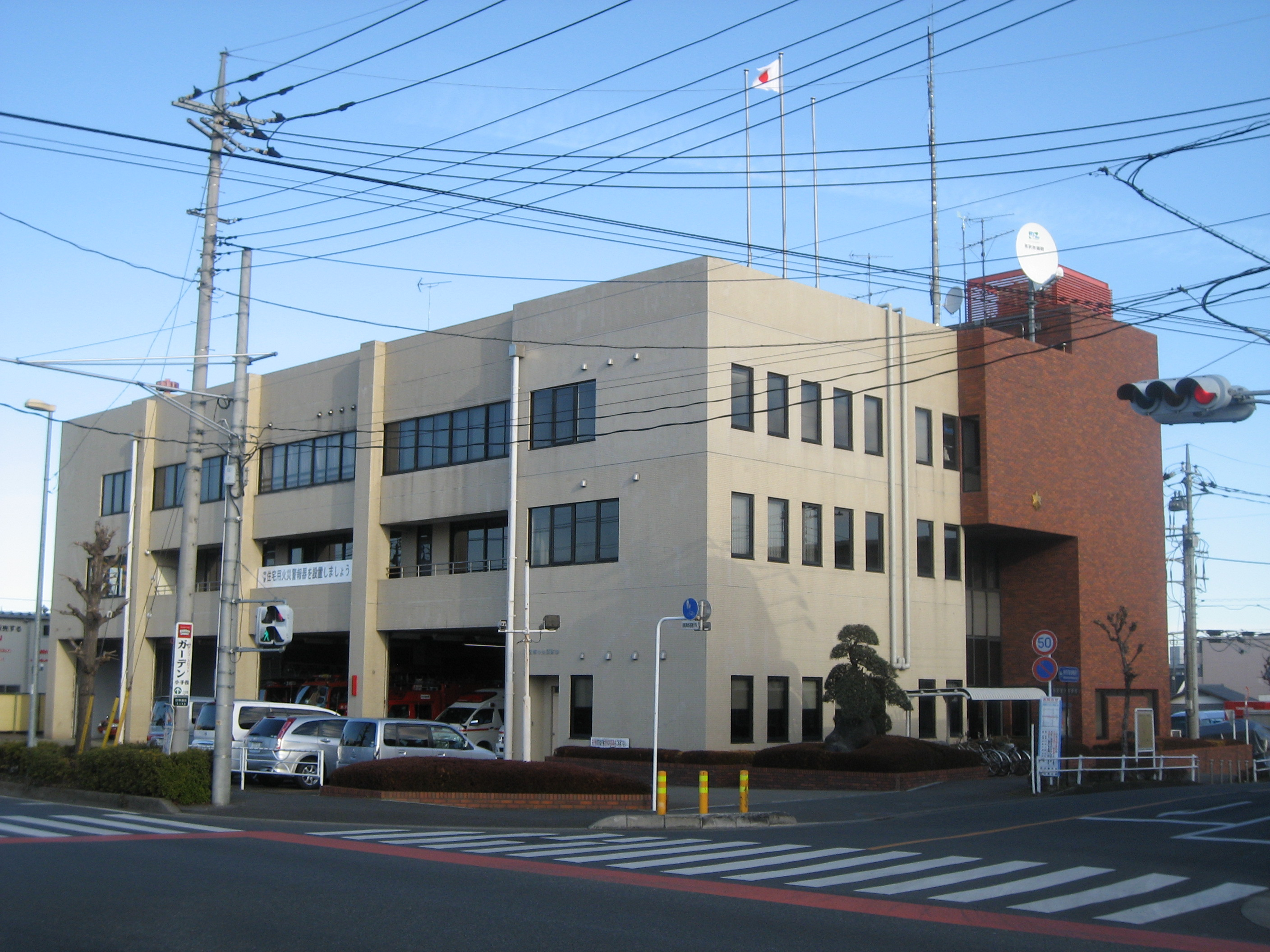 所沢市消防本部中央消防署庁舎